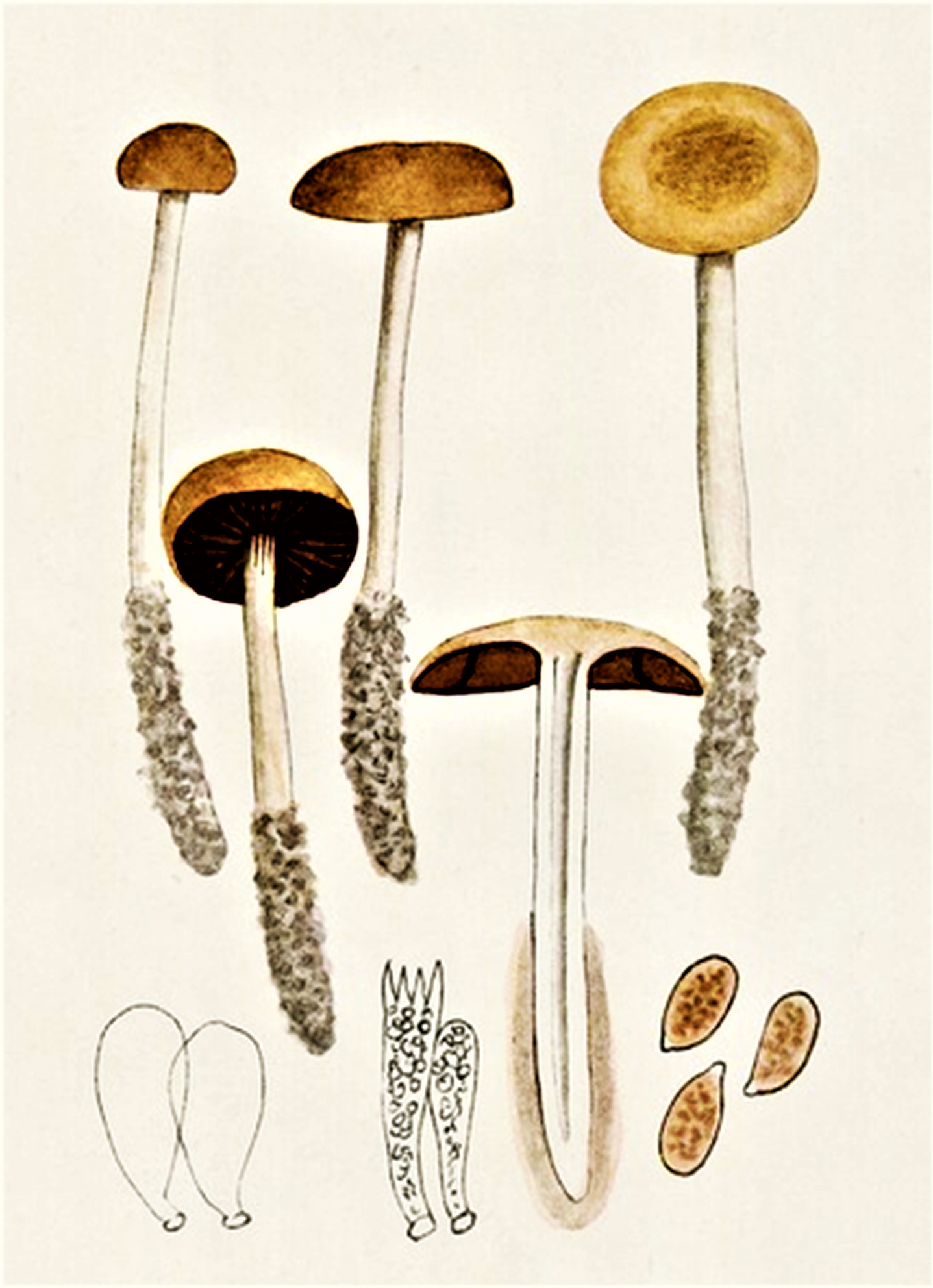 Giacomo Bresadola: Psilocybe ammophila (Durieu & Lév., 1846) Gillet (1878) heute Psathyrella ammophila (Durieu & Lév.) P.D.Orton (1960)